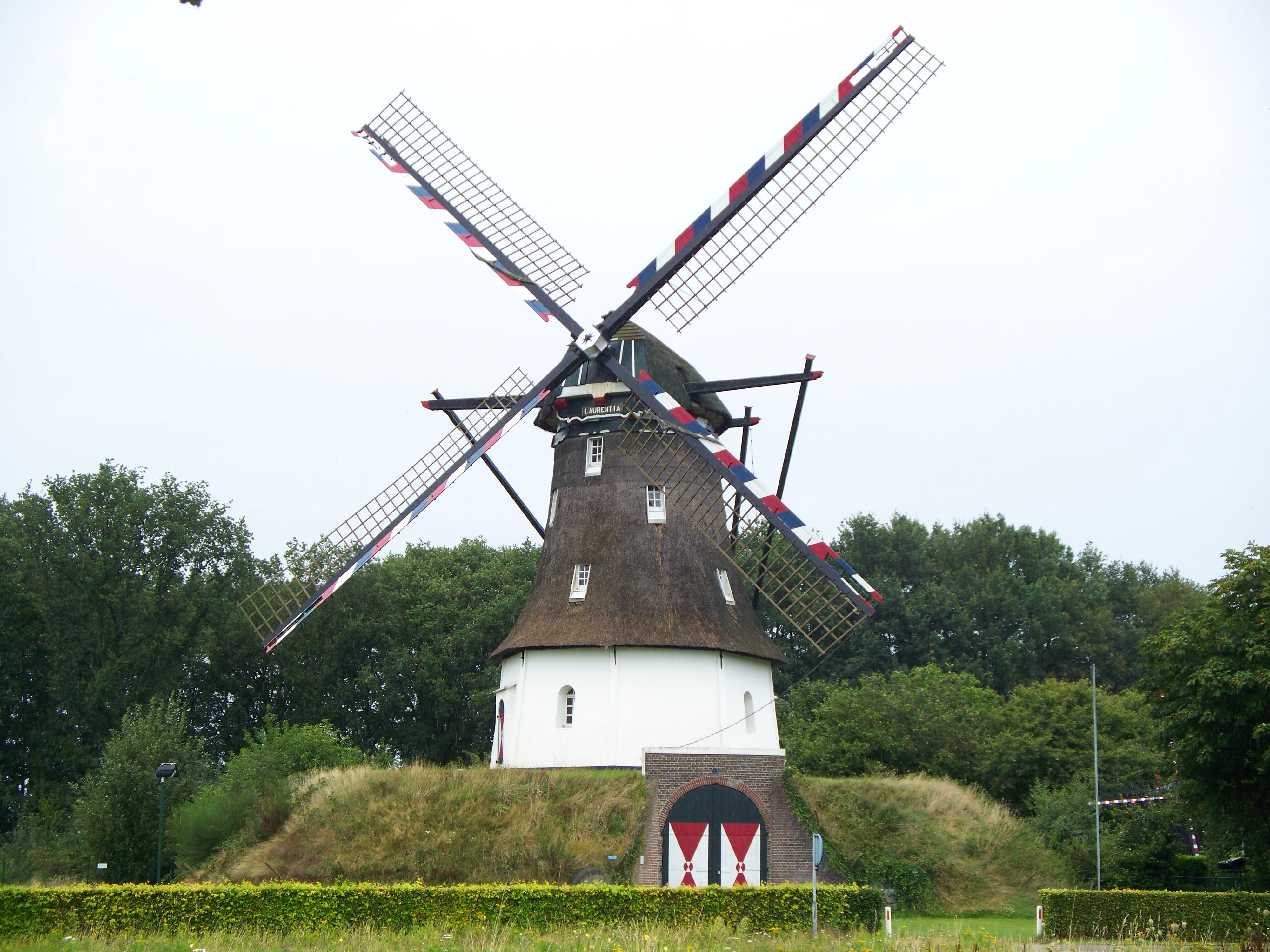 Windmolen Laurentia te Milheeze, Hoberg